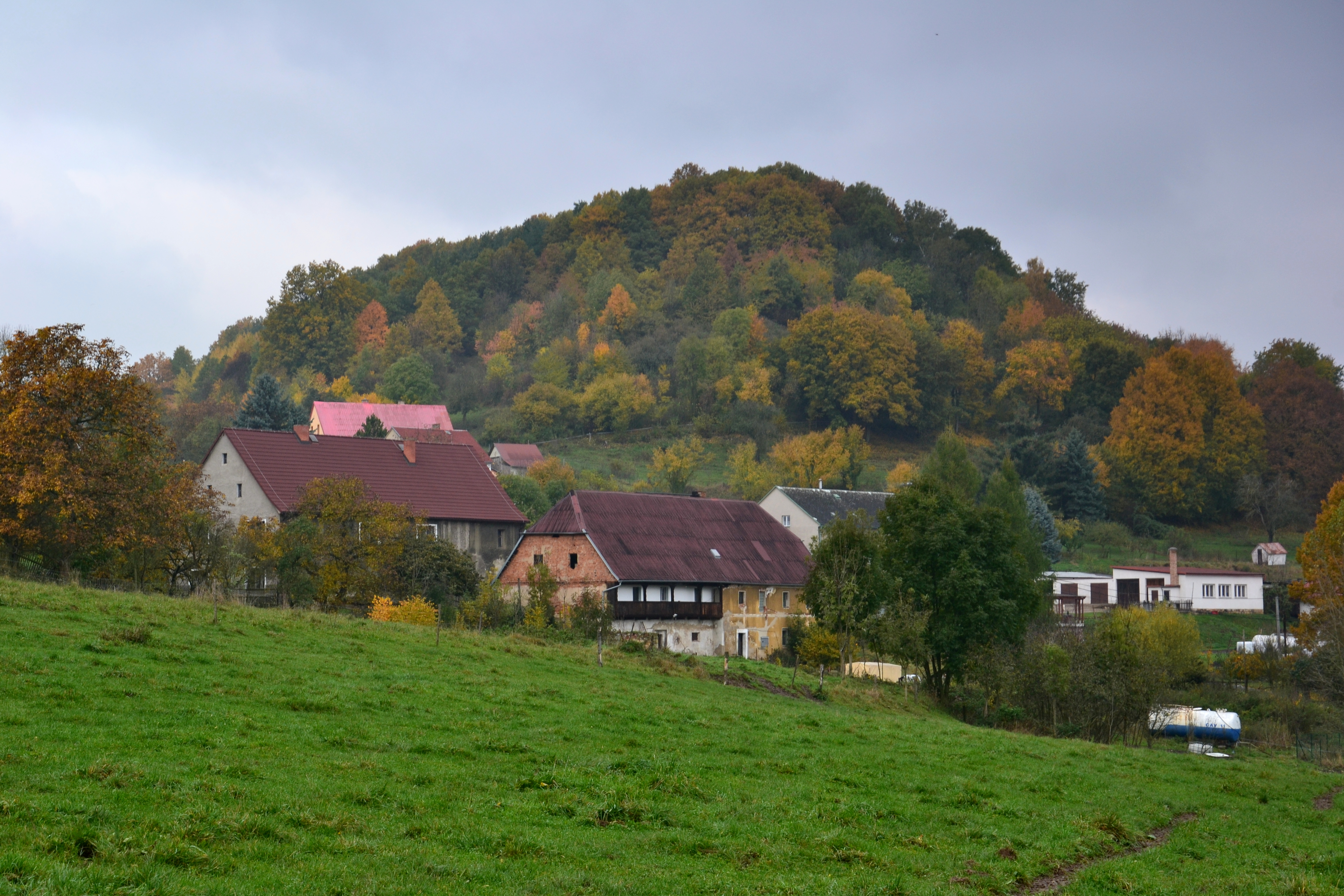 Horní část osady z jihu